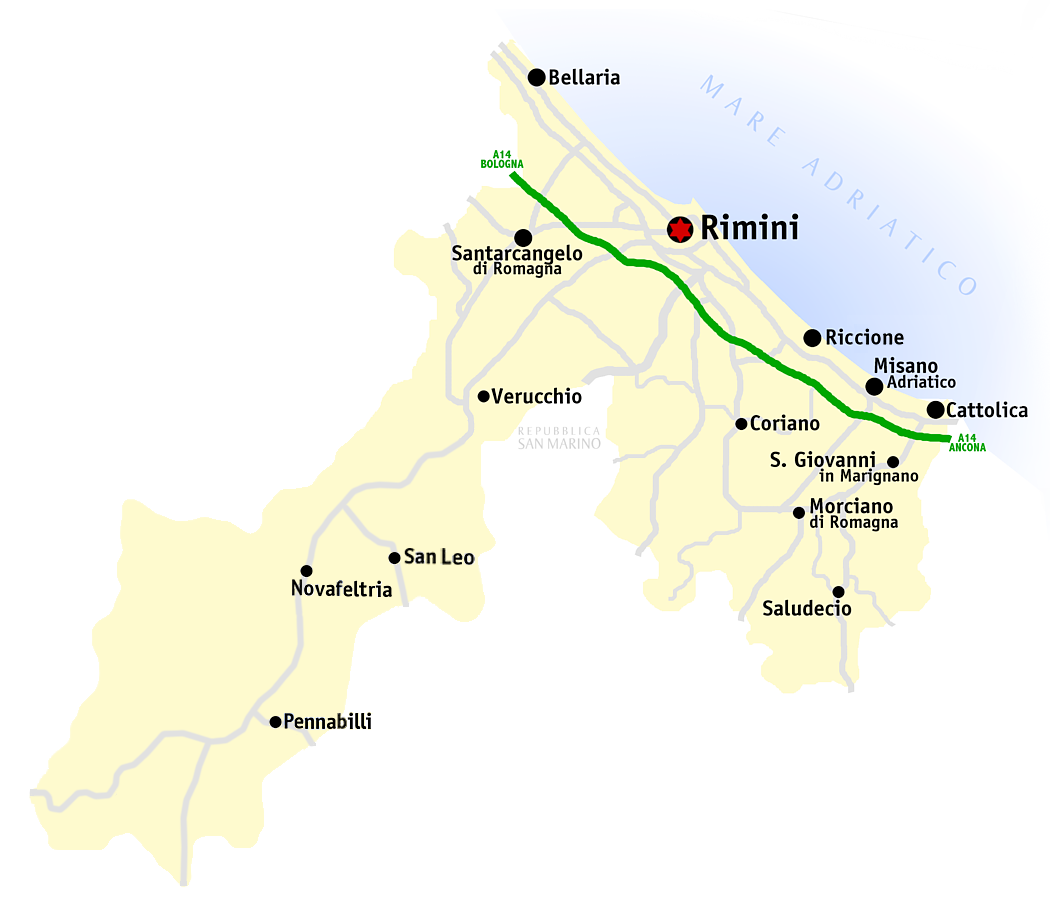 Kaart van de provincie Rimini